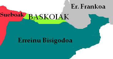 Baskoien kokalekua VI. mendean